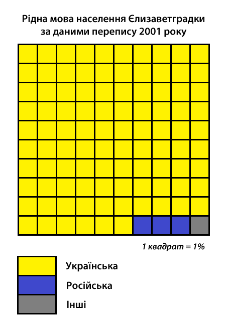 Інфографіка розподілу населення смт Єлизаветградка Олександрівського району за рідною мовою згідно з даними перепису 2001 року. Джерело: Розподіл населення Кіровоградської області за рідною мовою (у % до загальної чисельності населення) за переписом 2001 року